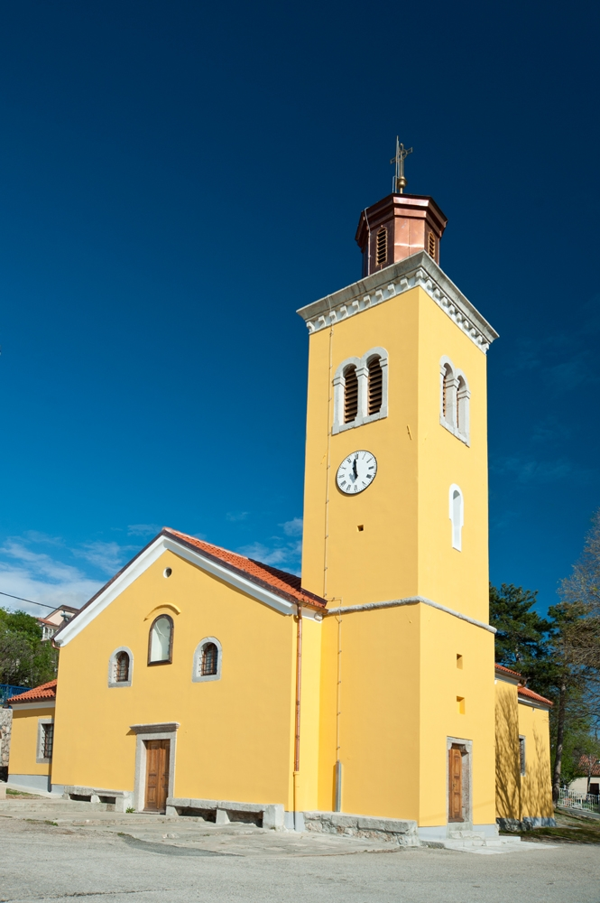 Crkva Svete Jelene u Dramlju, Hrvatska